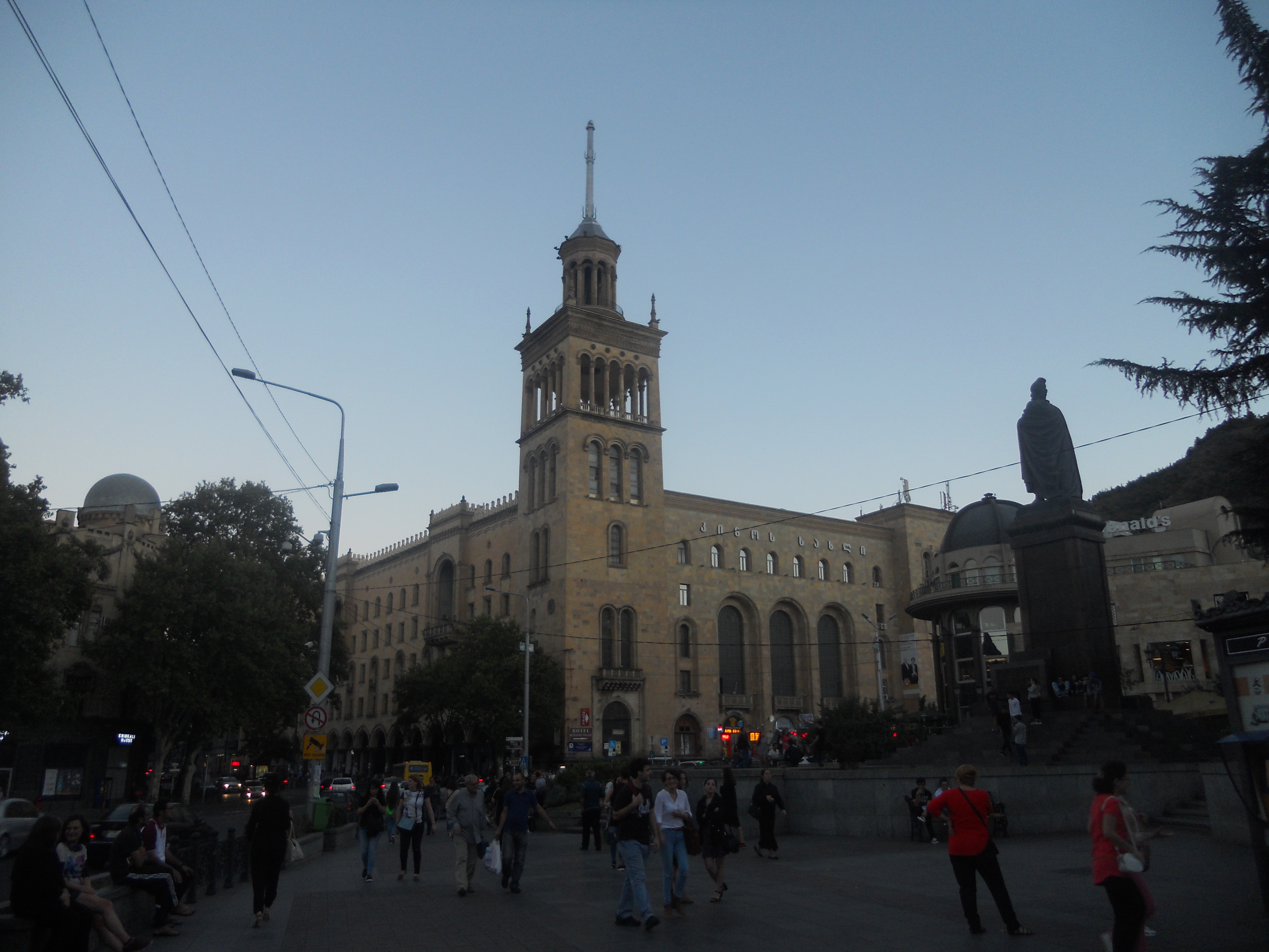 საქართველოს მეცნიერებათა აკადემიის პრეზიდიუმი